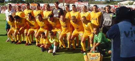 Esta foi a equipe do "15" que disputou a final do GauchÃ£o/2005 contra o Internacional. Venceo nos 90 minutos por 2 a 0. Perdeu na prorrogaÃ§Ã£o por 2 a 1.